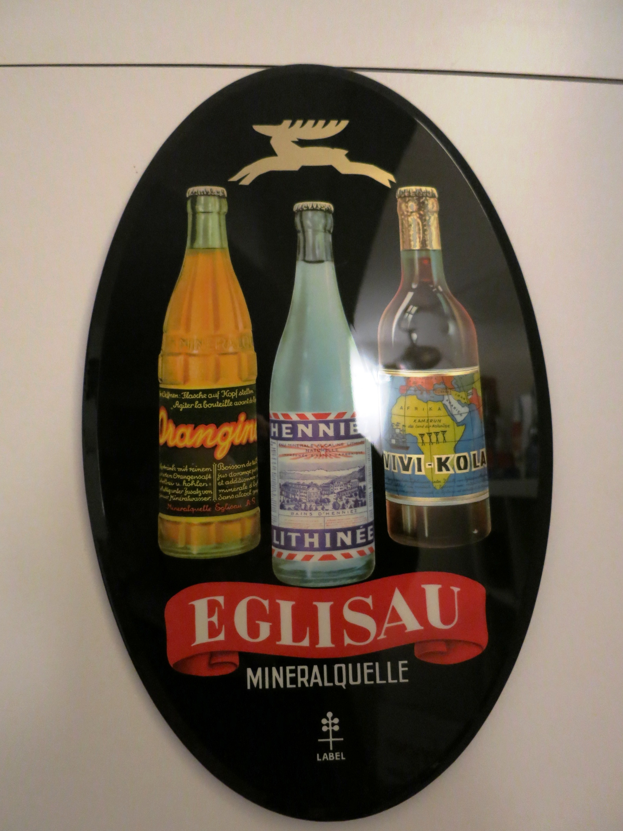 historische Werbung, Mineralwasser Eglisau ZH, Schweiz